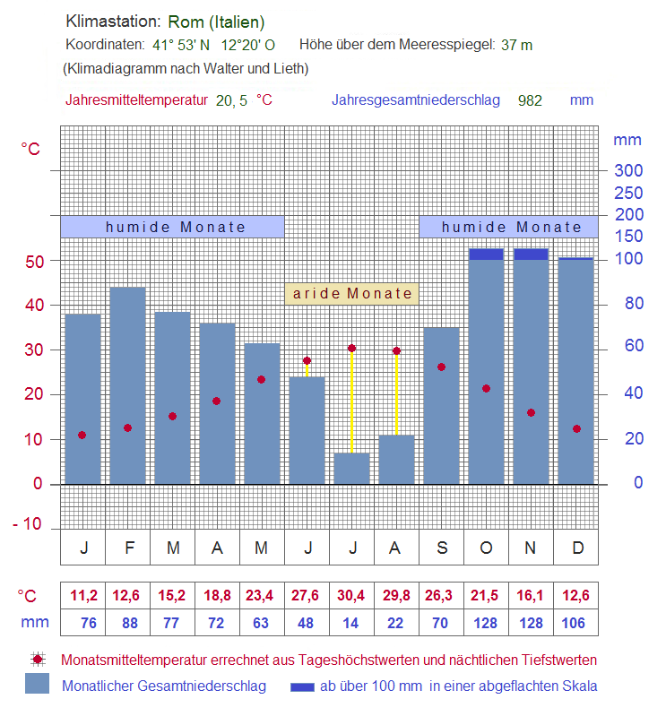 Klimadiagramm von Rom (Italien)